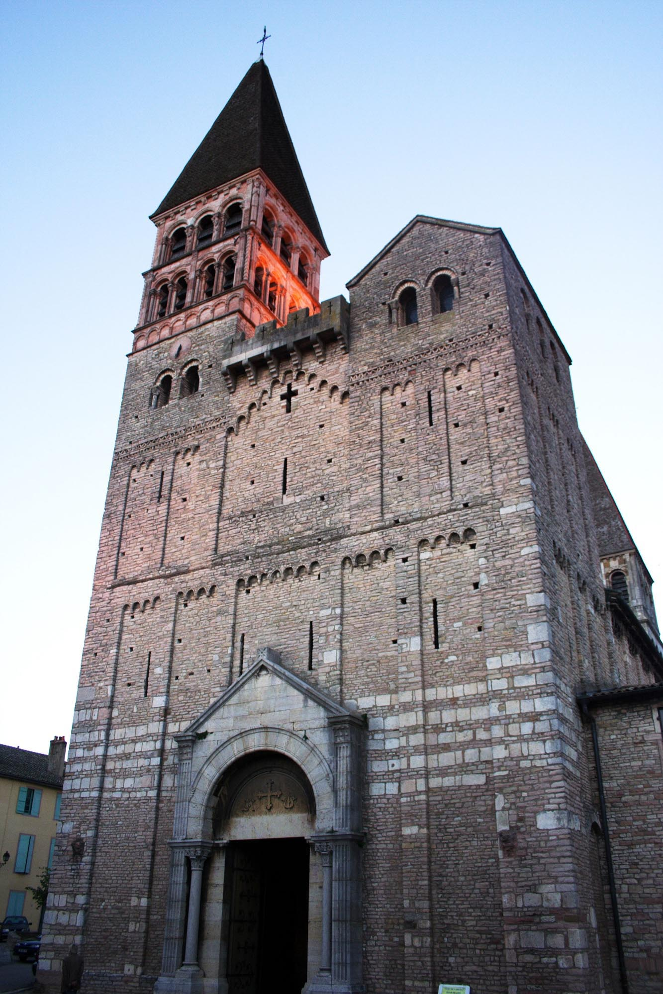 Tournus, façade de l'église abbatiale Saint-Philibert